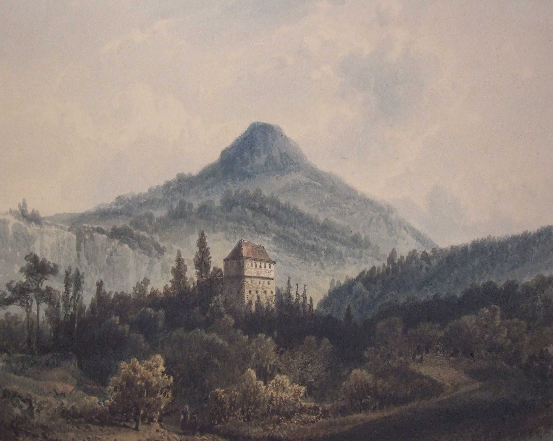 Schloss Wäscherburg, Wäschenbeuren GP, Aquarell von Pieter Francis Peters (1819 - 1903), 1855